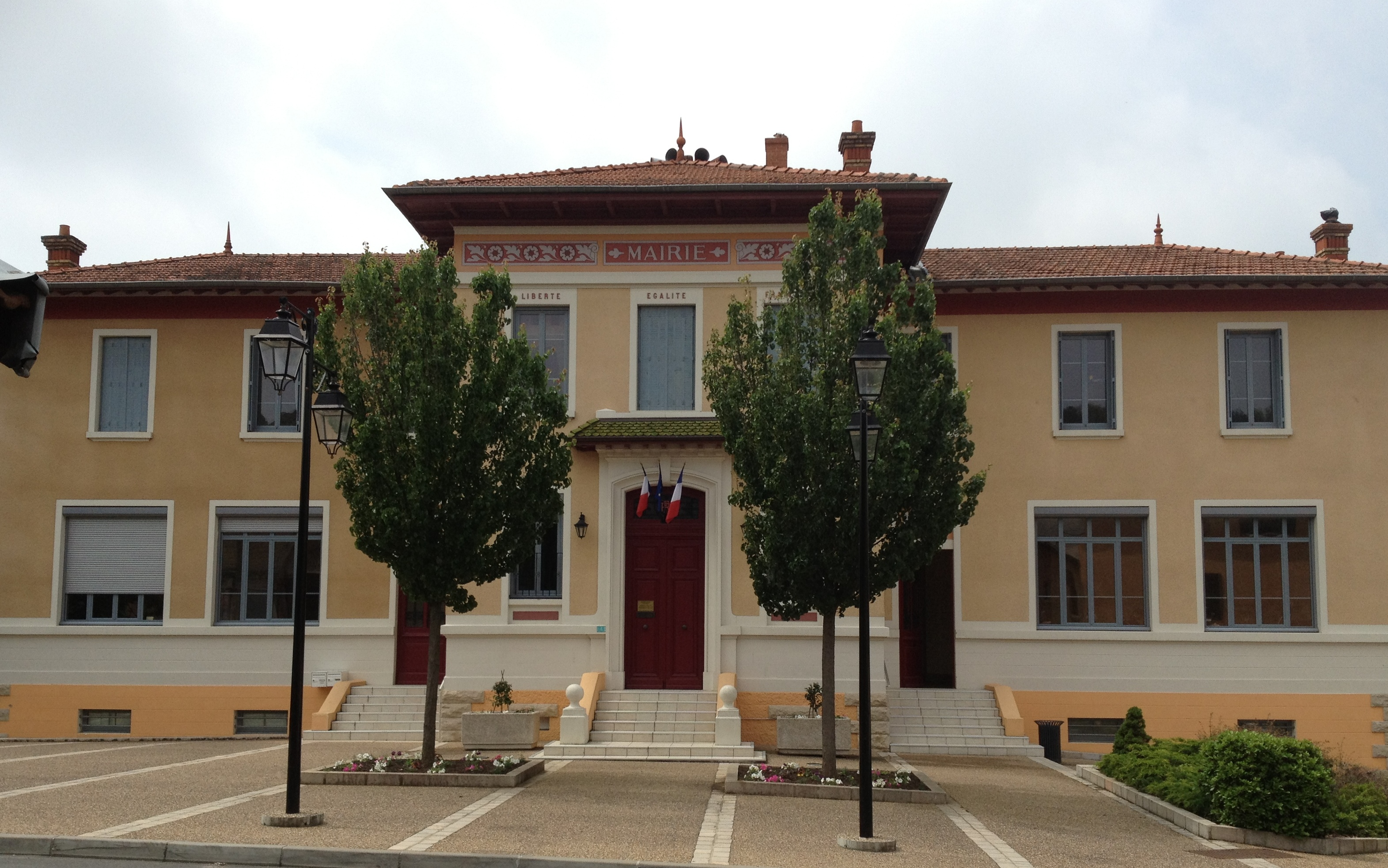 Photo de la Mairie de Parcieux